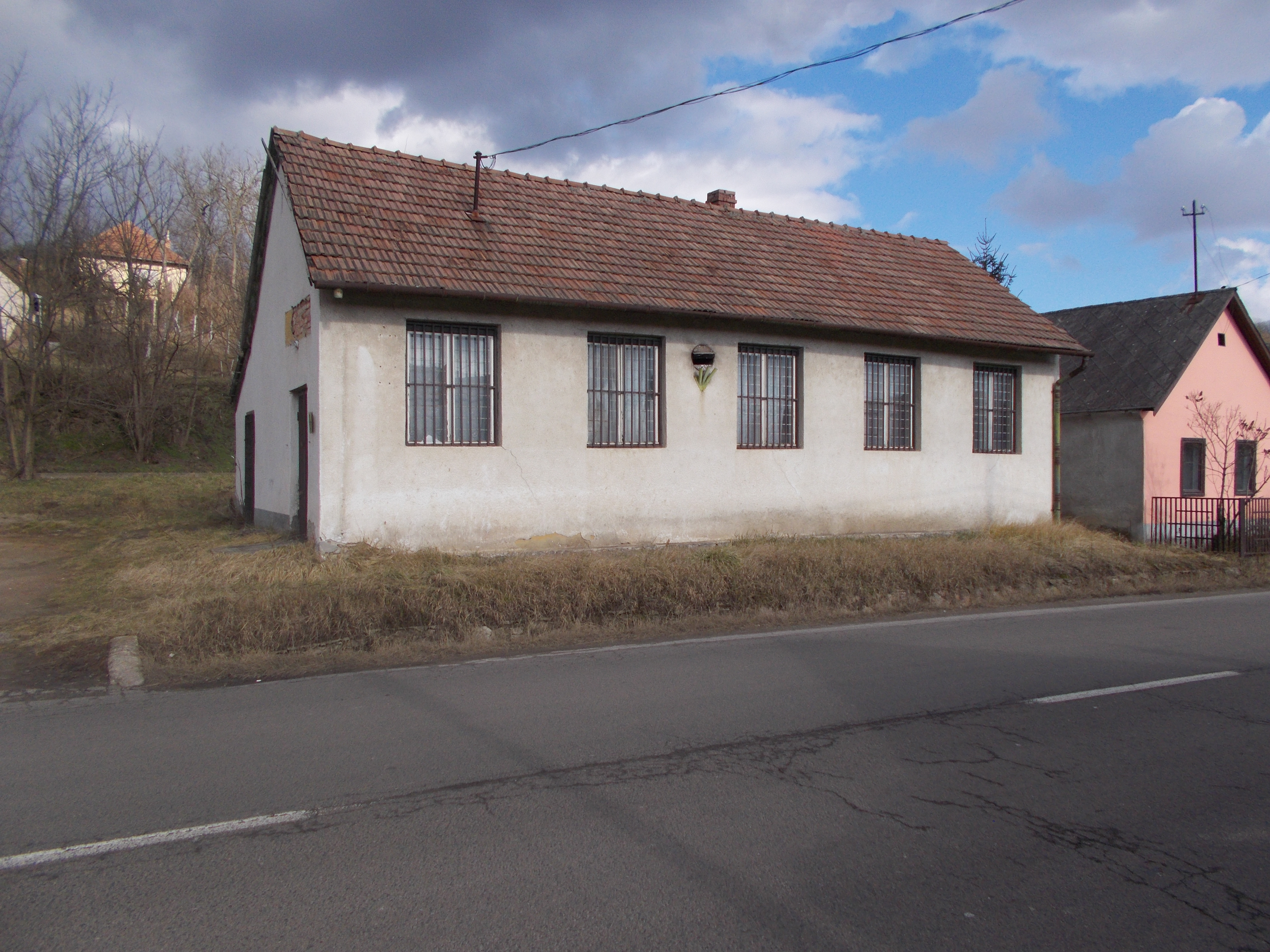 A volt postahivatal Nemtiben